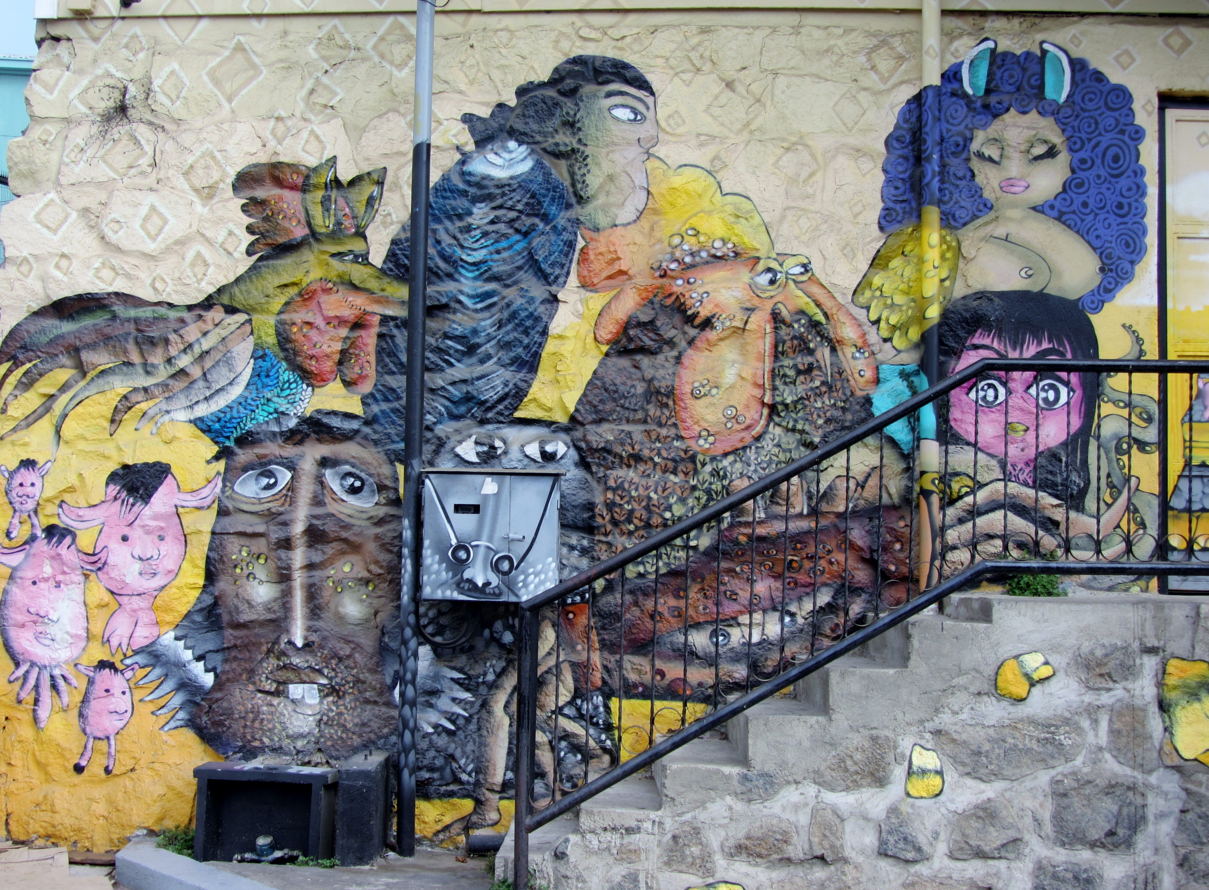 La gallada (detalle), mural realizado por los grafiteros Unkolordistinto reproduciendo los dibujos de Lukas (Renzo Pecchenino) en la parte inferior de la cara norte del hotel boutique Casa Vander (paseo Dimalow 135), junto a la estación superior del ascensor Reina Victoria en la Plazoleta Lukas.